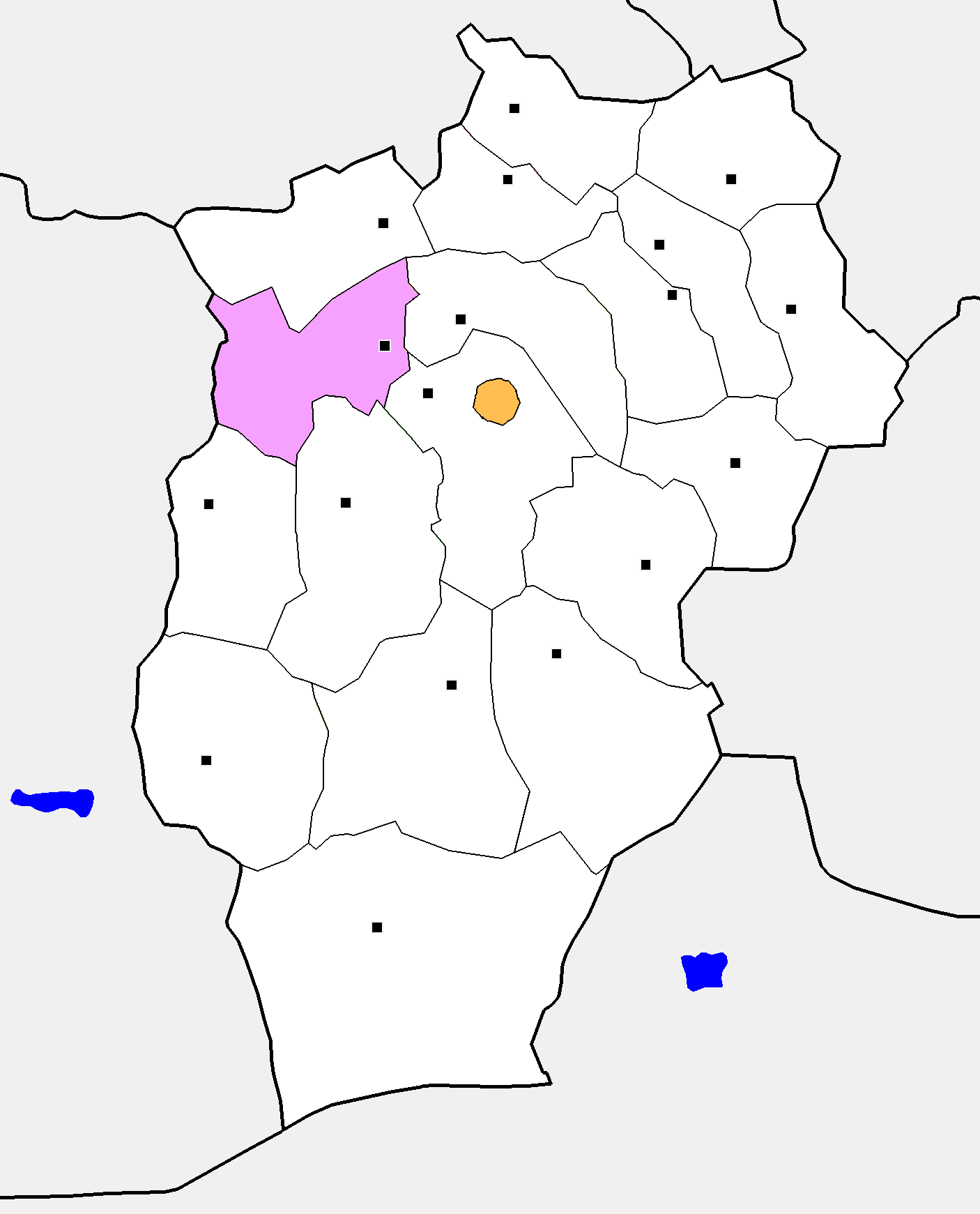 Монгол: Өвөрхангай аймгийн Уянга сумын байршил